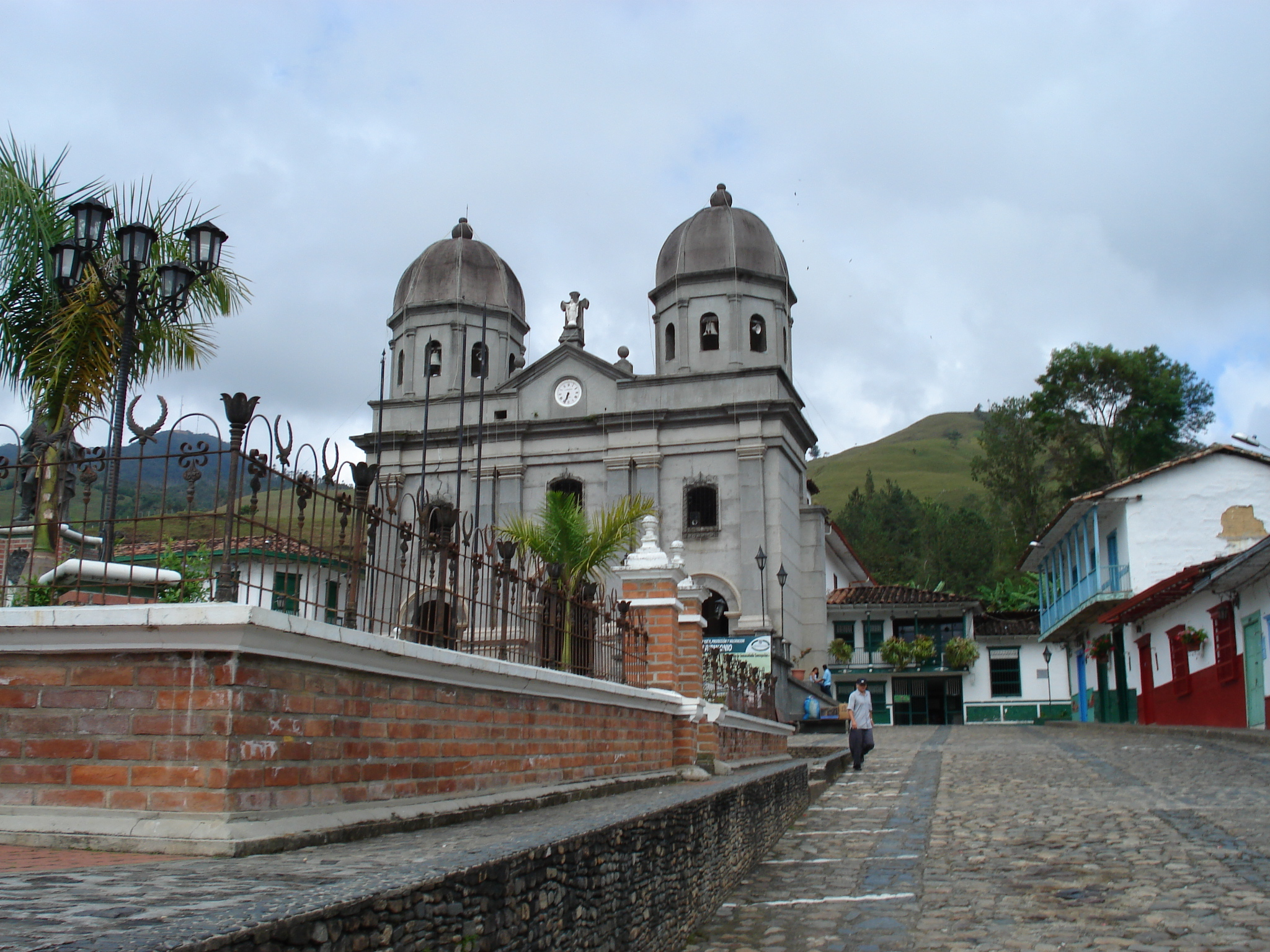 Iglesia de Concepción, Departamento de Antioquia. ColombiaConcepción / Barbosa